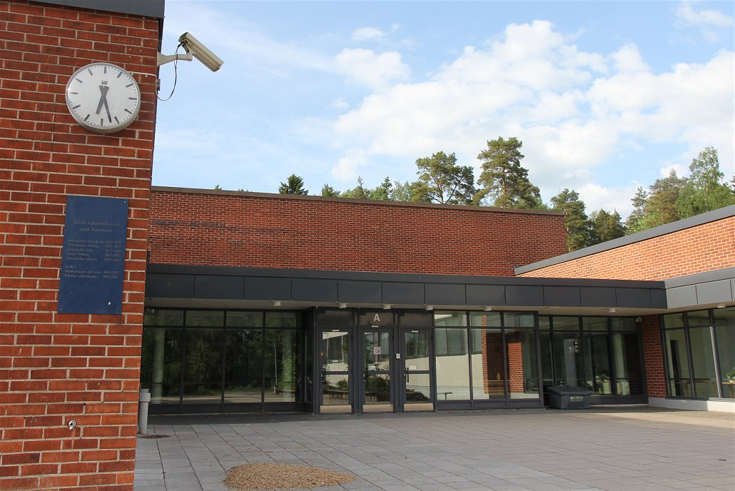 Simonkylän koulu on Vantaan Tikkurilan suuralueen Simonkylässä toimiva peruskoulun yläluokkien koulu.